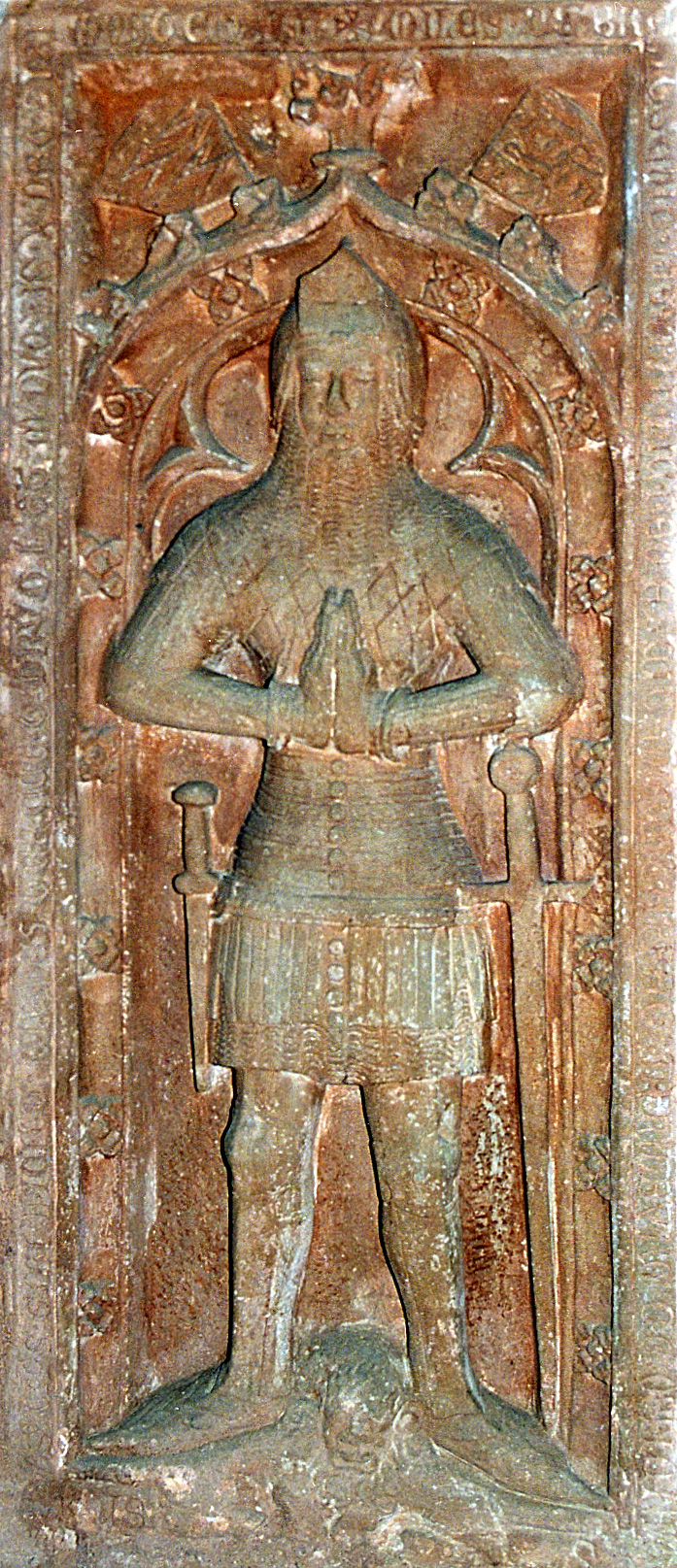 Grabplattes des Johann von Brandscheid † um 1370 in der Stiftskirche Kyllburg